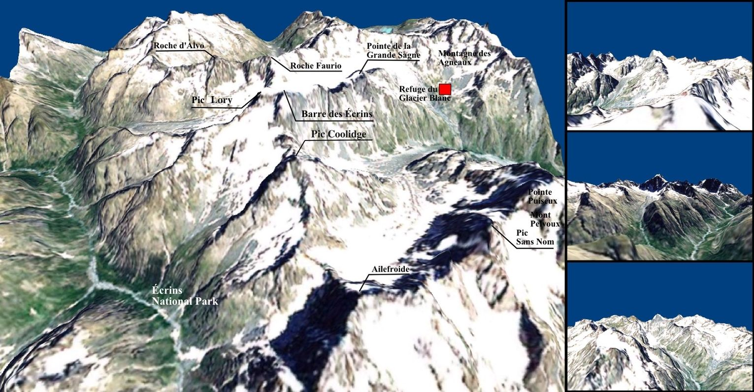 Prelucrare 3D a muntelui Barre des Écrins realizata cu date SRTM furnizate liber de NASA.